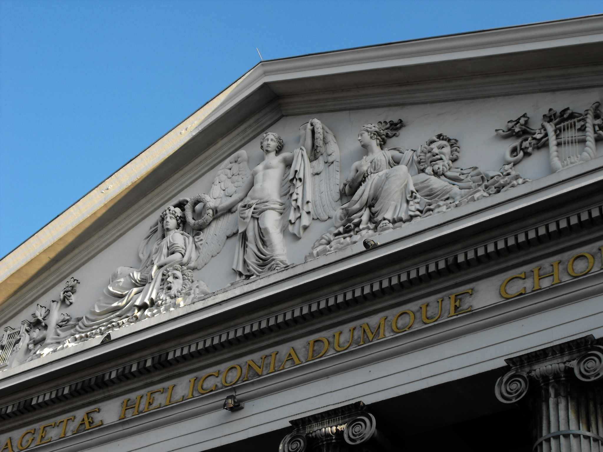 Tympanon des Stadttheaters Aachen